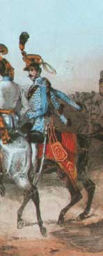 Husarenoffizier des 6. k.k. Regiments